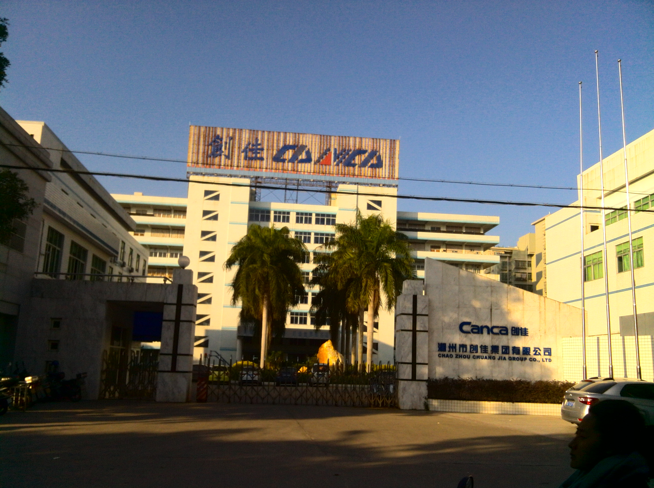 潮州创佳集团有限公司，位于凤园路。